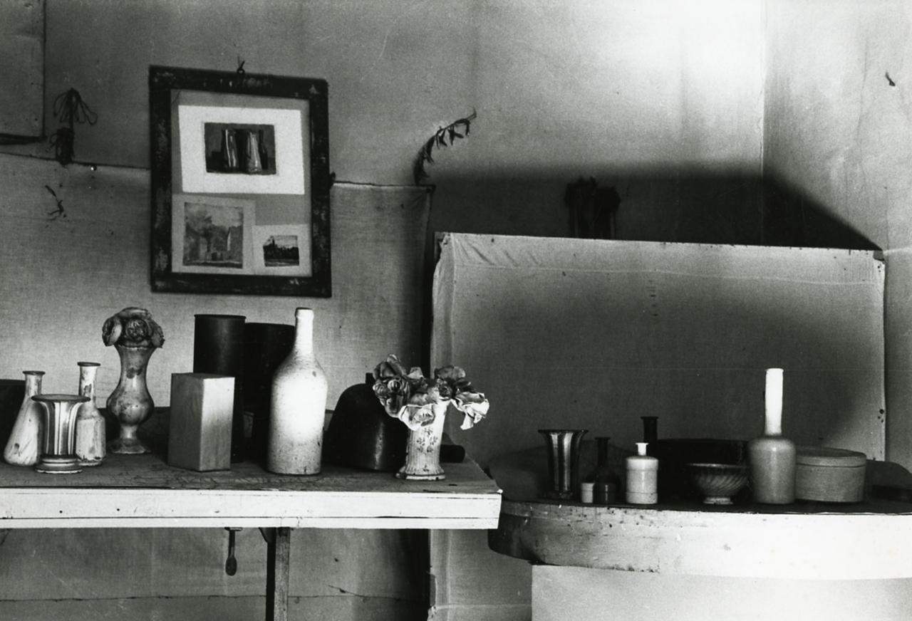 Servizio fotografico : Bologna, 1981 / Paolo Monti. - Stampe: 3 : Positivo b/n, gelatina bromuro d'argento/ carta, 24x30. - ((Al verso delle stampe manoscritti i numeri dei negativi corrispondenti (formato 35 mm) con indicazione del fotogramma: 3730/10, 3730/19, 3730/25; timbro a inchiostro con copyright: "© Copyright/ Credit to/ Paolo Monti/ Corso Sempione [...]/ Milano". - Sul coperchio della scatola iscrizione didascalica manoscritta a pennarello nero: "Studi di Artisti". - Confronta schede 3730L02-37. - Occasione: Documentazione per mostra del pittore Giorgio Morandi negli Stati Uniti (riprese eseguite in collaborazione con il Professor Nino Castagnoli). - , presso Archivio Paolo Monti. N. 72 fotografie stampate in formato 24x30 e 30x40 dei luoghi appenninici e dello studio del pittore Giorgio Morandi. - Fonte: Monografia: L'immagine dell'Appennino bolognese: dai disegnatori dell'Ottocento a Giorgio Morandi, catalogo della mostra, Grizzana Morandi 1984, a cura di Stefano Calabrese, Silvia Camerini, Bologna, Nuova Edizioni Alfa (1984). - Fonte: Agenda di Paolo Monti: Nikon Leika 3001-/ Monti 1978 (1978-1982), presso Archivio Paolo Monti. - Fonte: Fattura di Paolo Monti: IV. Commesse/ Fattura n. 36/ Fotografie per mostra del pittore Morandi negli Stati Uniti (1981/10/11)